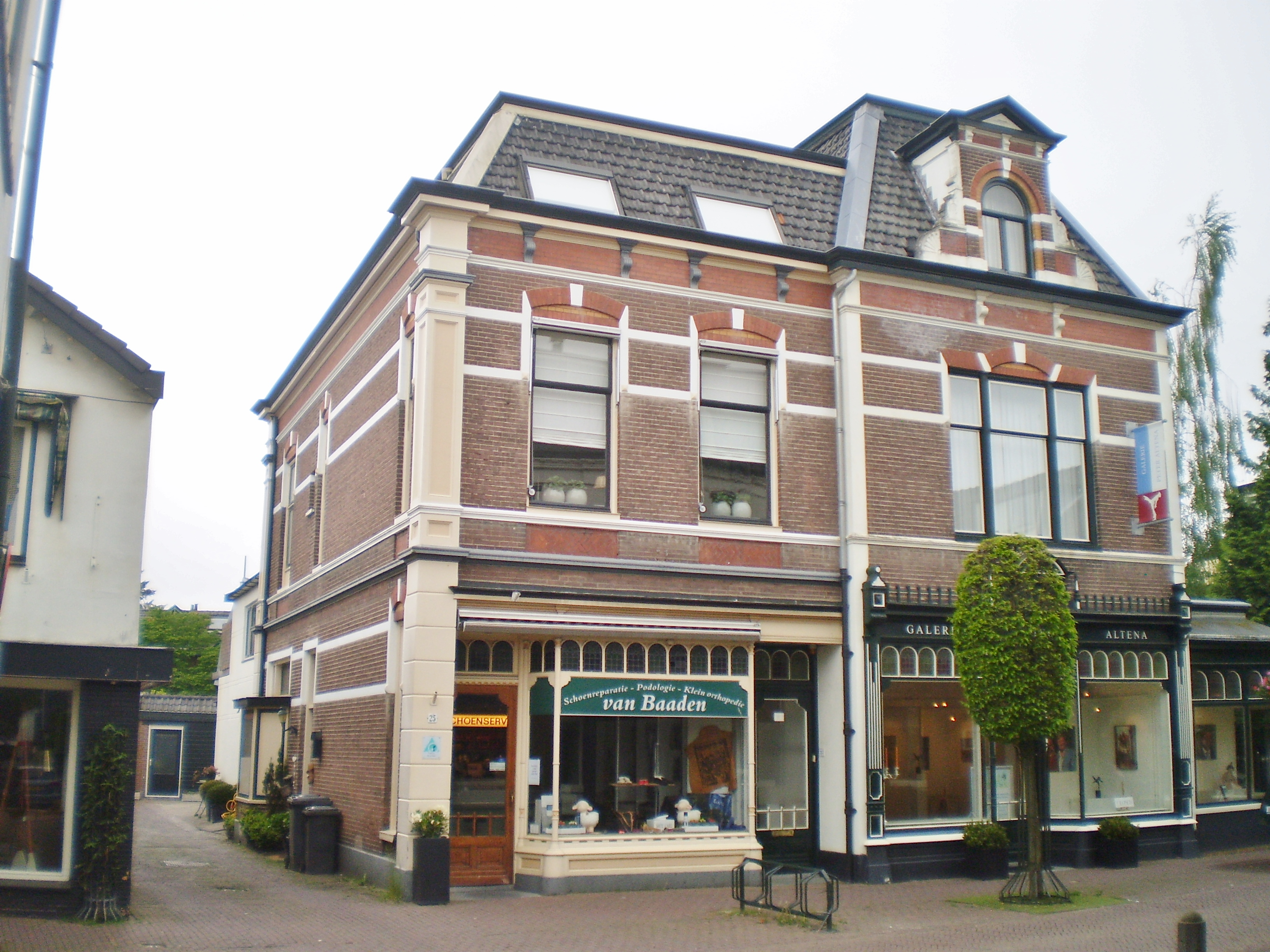 In 2013 een schoenmakerij